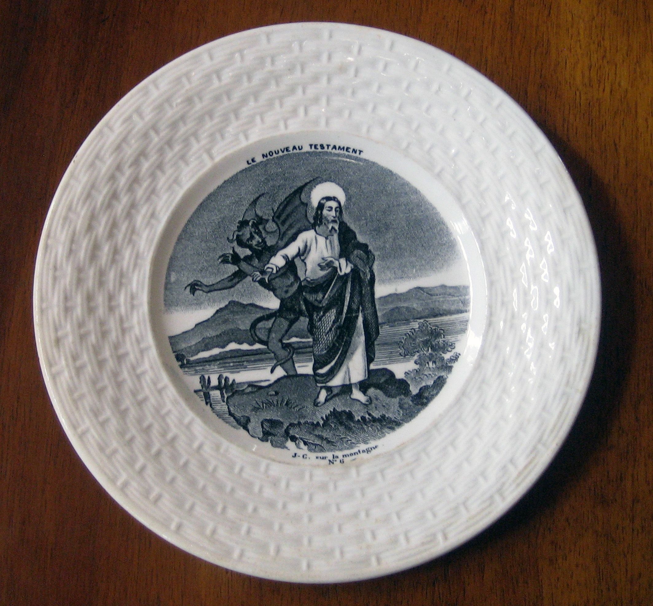 Plato de porcelana de Gien (Francia) de la serie Le Nouveau Testament Final del siglo XIX o principio del siglo XX